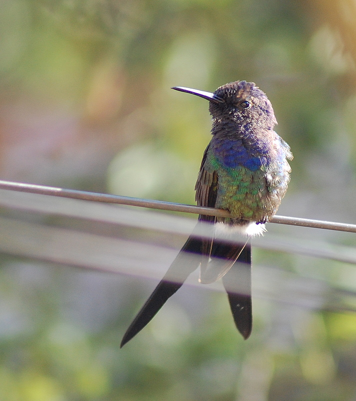 No quintal da casa de meus pais na cidade de Piraju-SP.